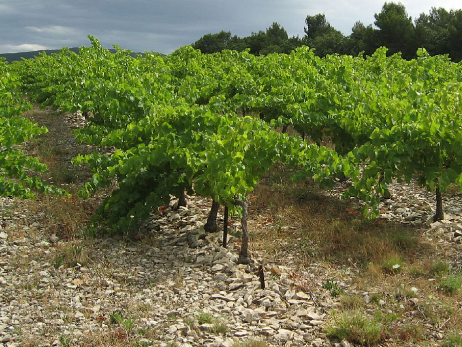 Vignoble de Séguret sur le chemin du Crestet